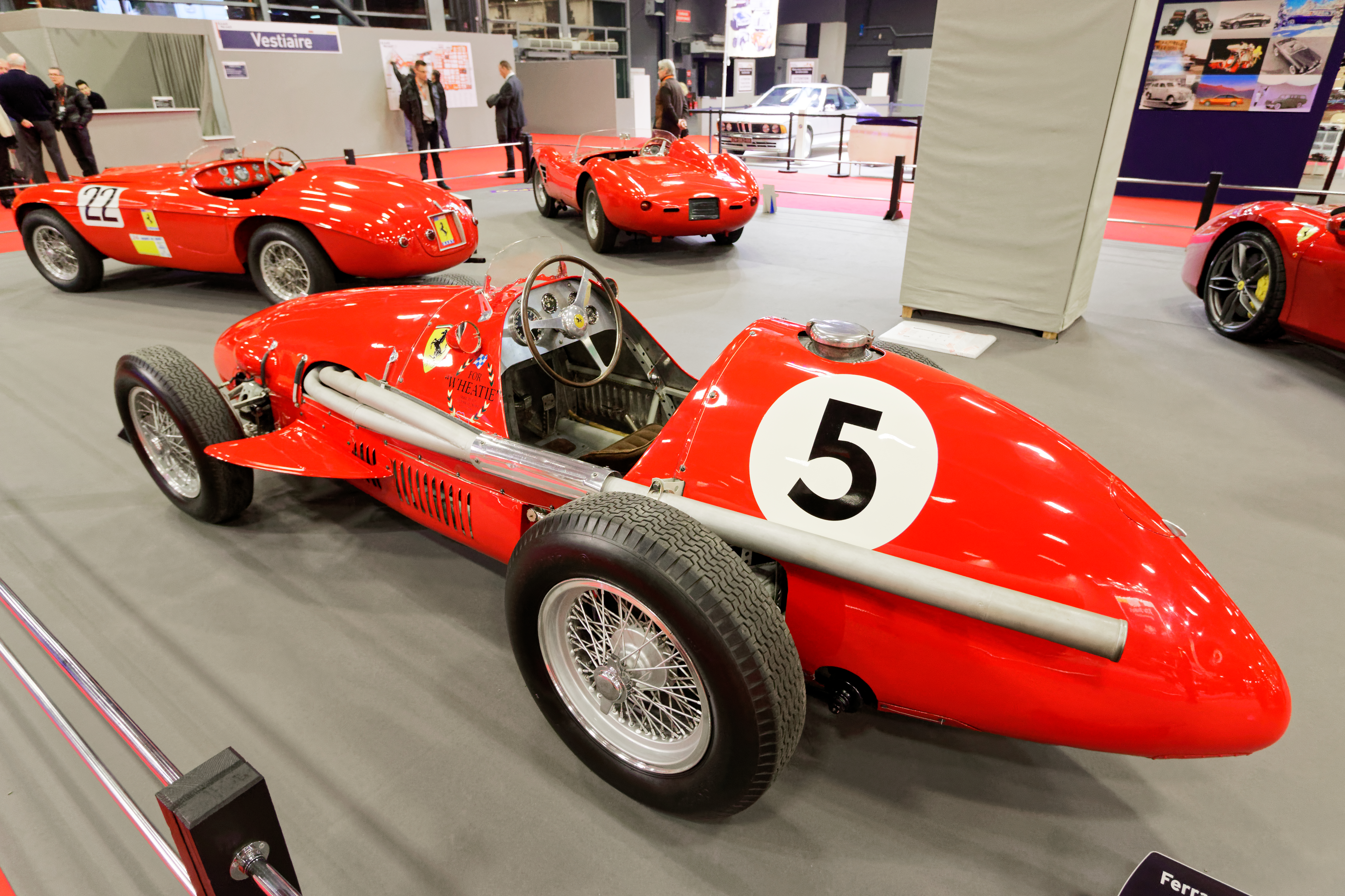 Une Ferrari Tipo 500 de 1952 exposée lors du salon Rétromobile 2017.